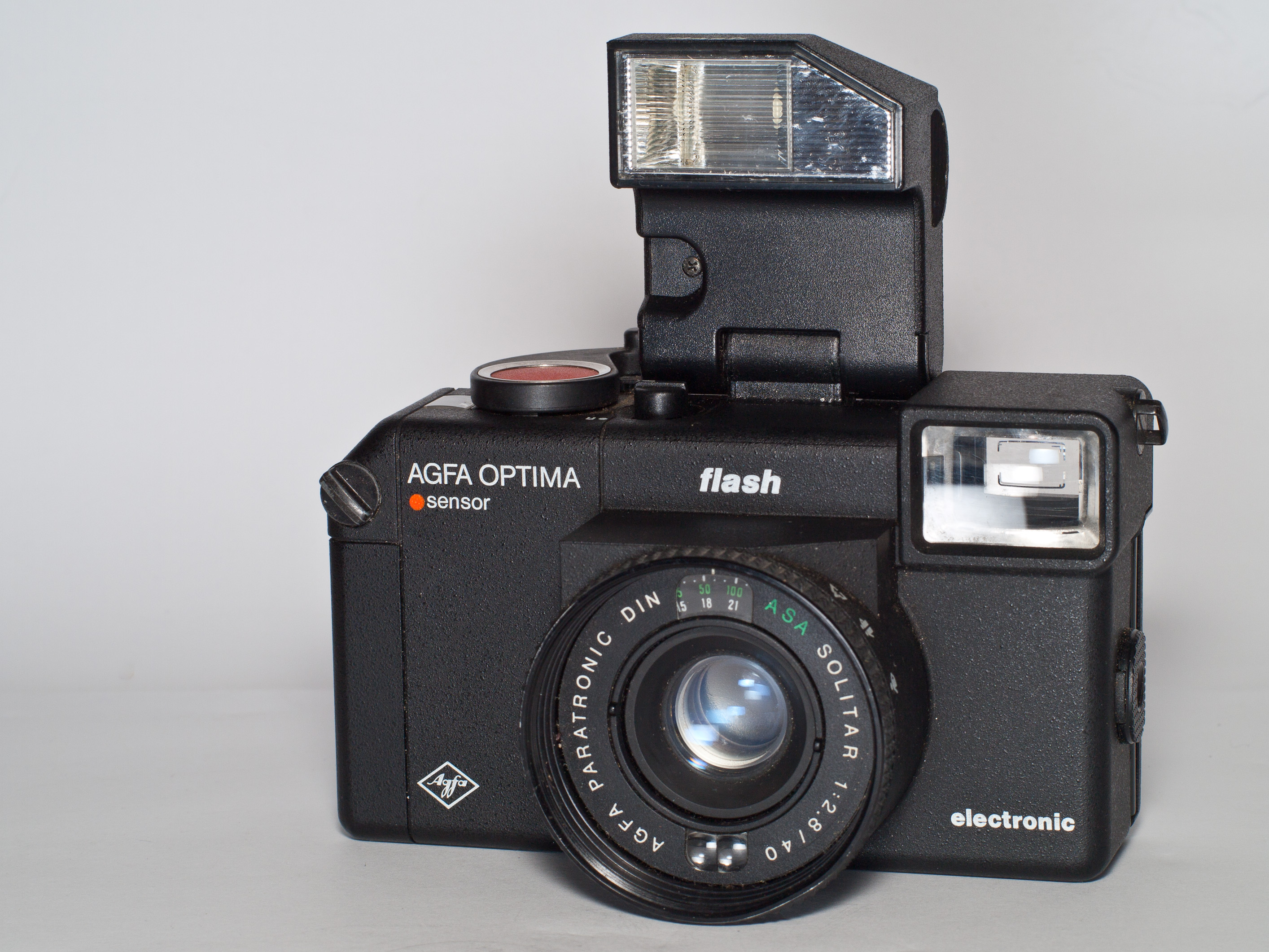 Agfa Optima Sensor 35mm camera